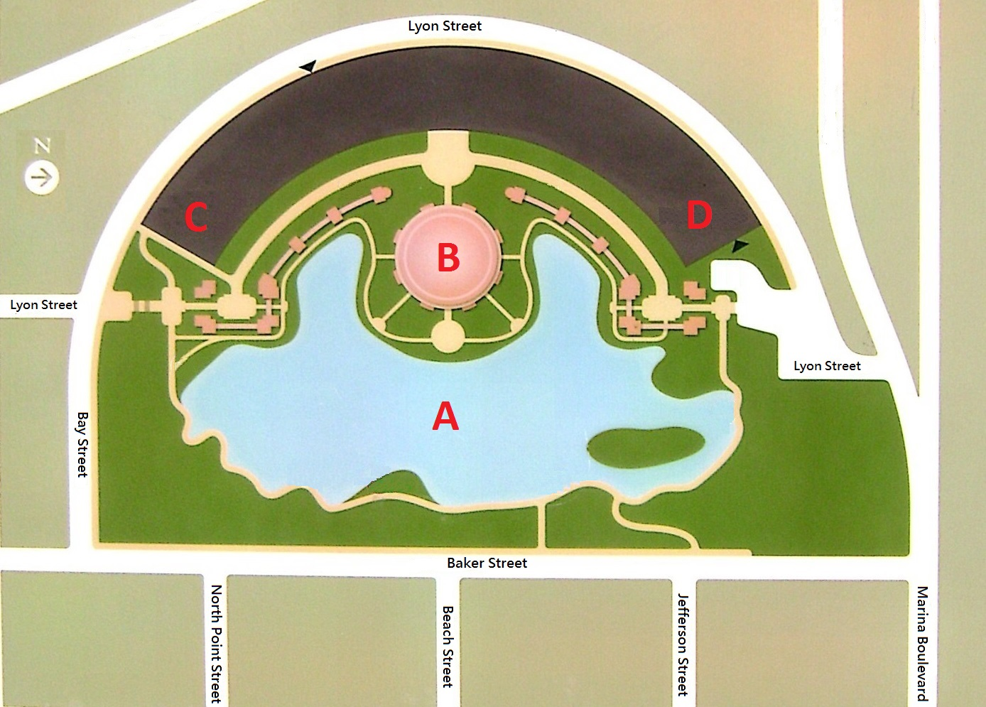 中文（台灣）: 藝術宮平面圖